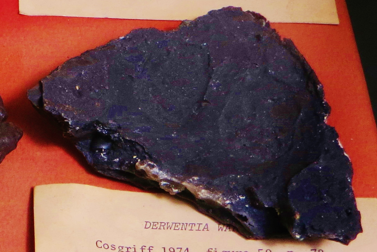 Fossil of Derwentia, an extinct amphibian- Took the photo at Musee d'Histoire Naturelle, Paris